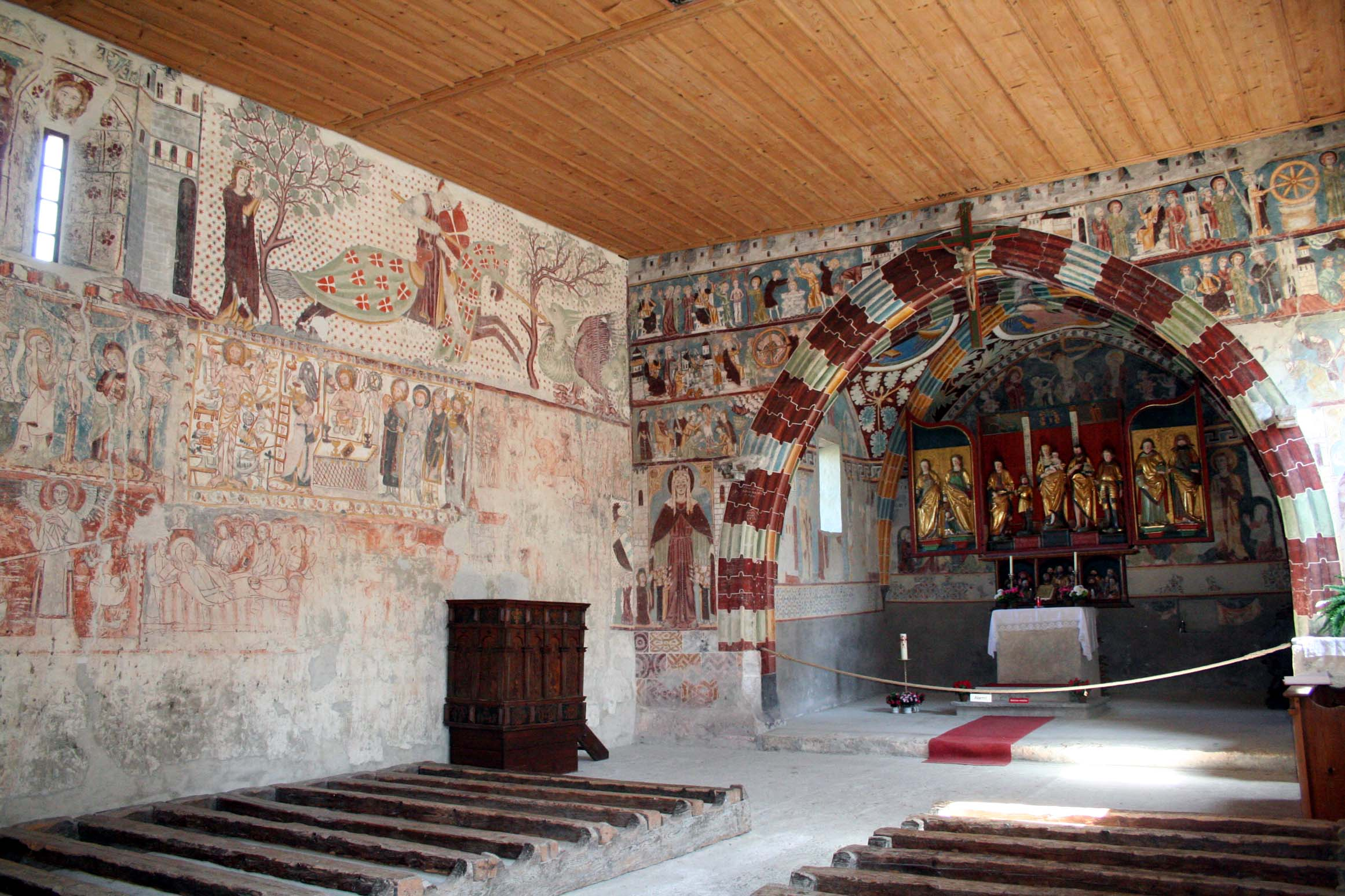 Innenraum